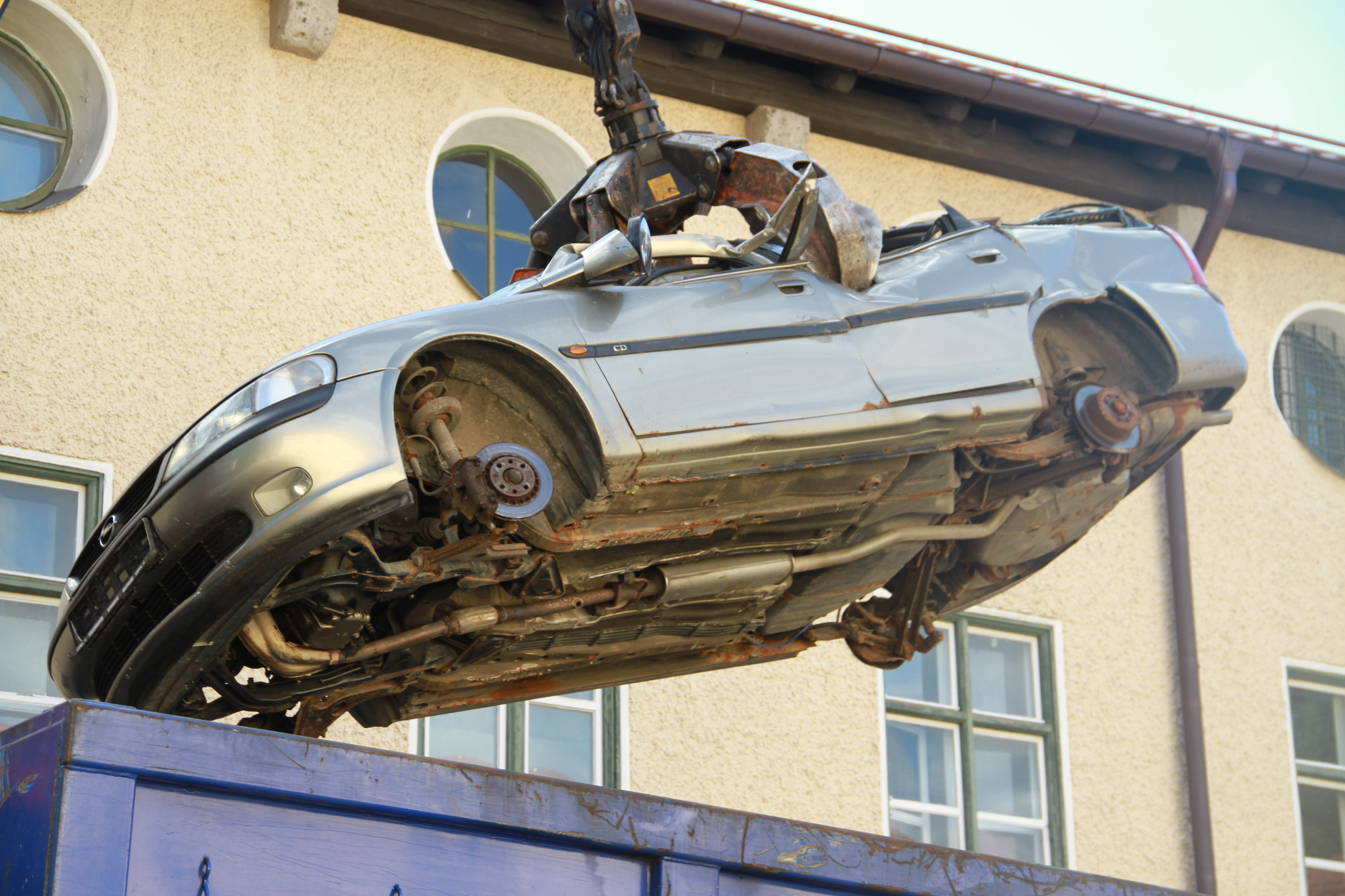 Autoverwertung, Autoverschrottung, Fahrzeugrecycling